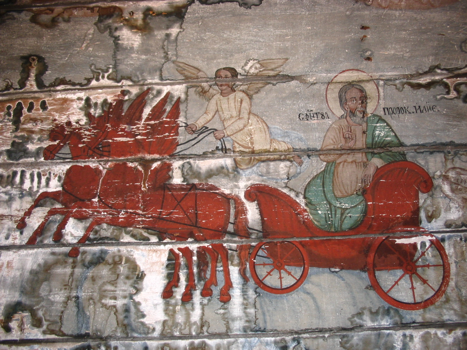 Biserica de lemn din Bârsa. Sfântul Ilie.